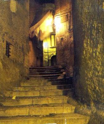 UNO SPLENDIDO SCORCIO DEL CENTRO STORICO DI COSENZA, VICO PADOLISI